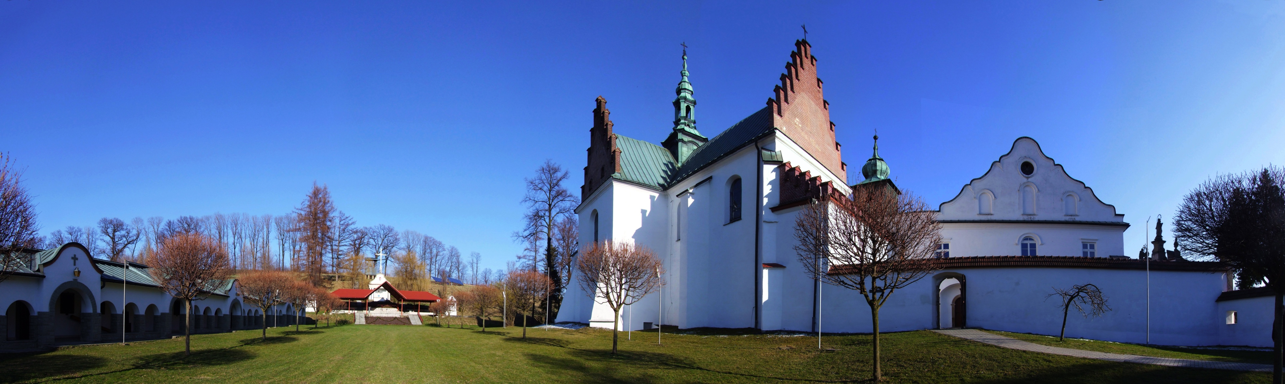 Klasztor Cystersów w Szczyrzycu